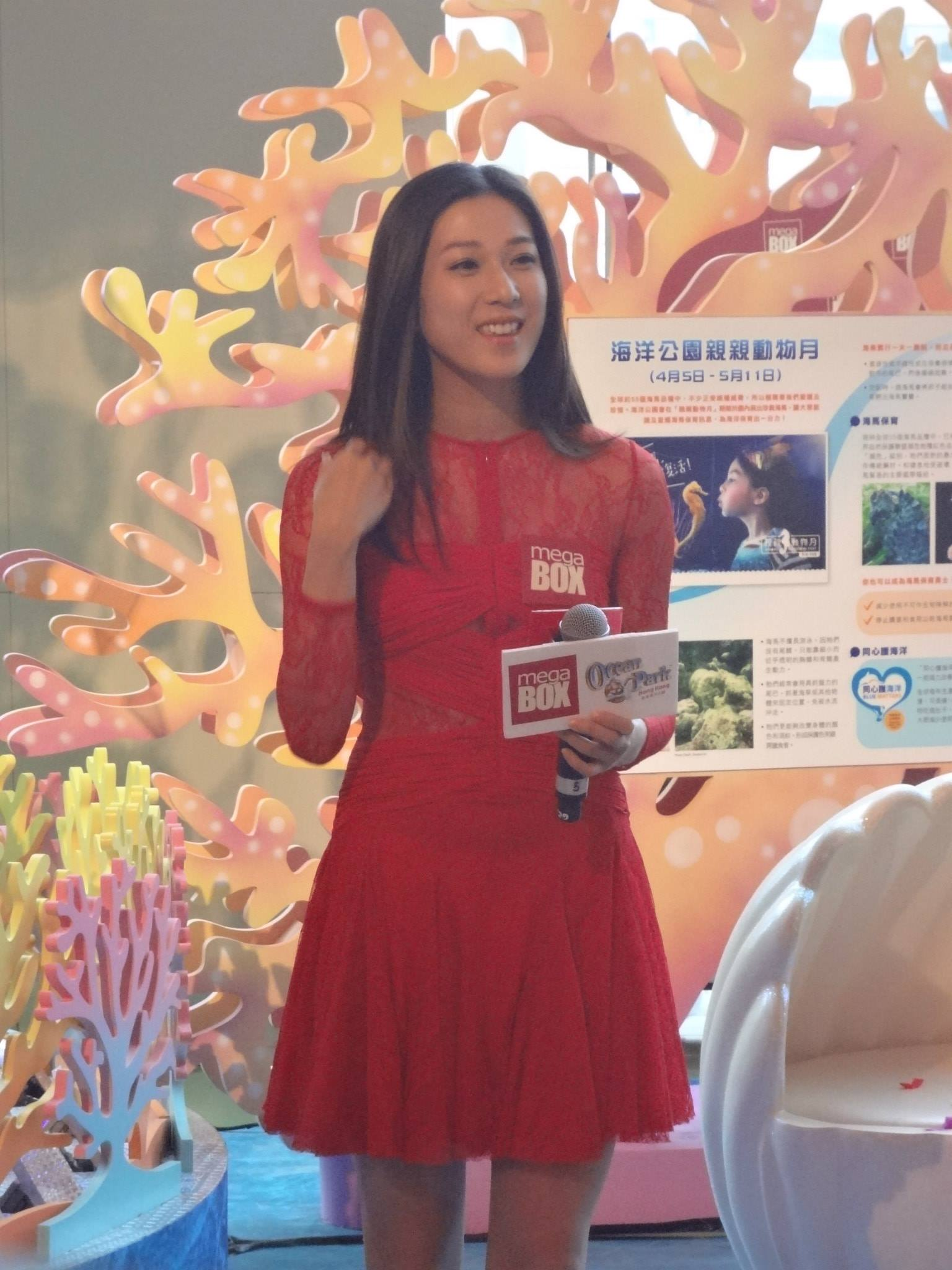 2014-3-23 MageBox